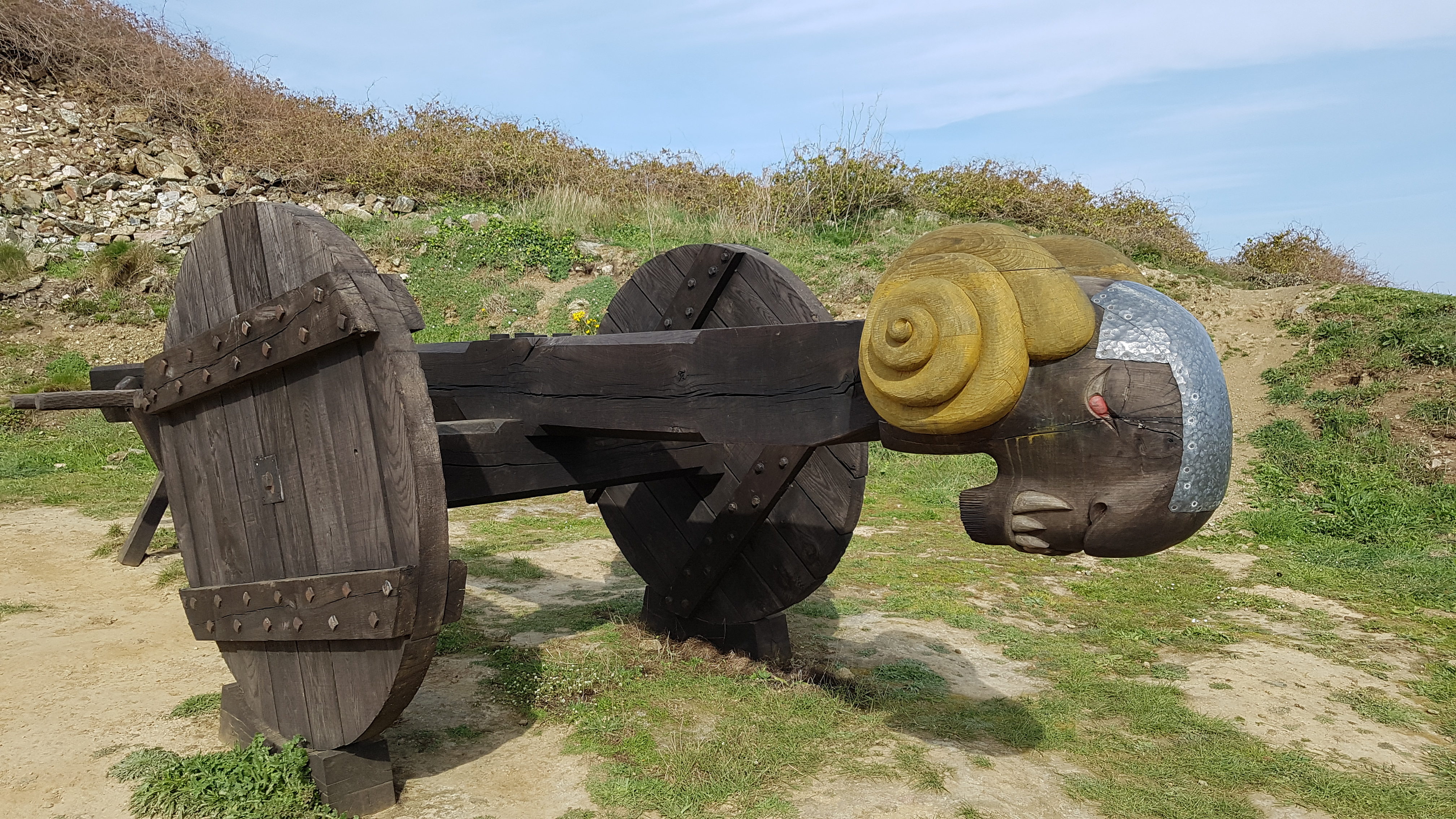 Fort la Latte - bélier devant le 1er chatelet